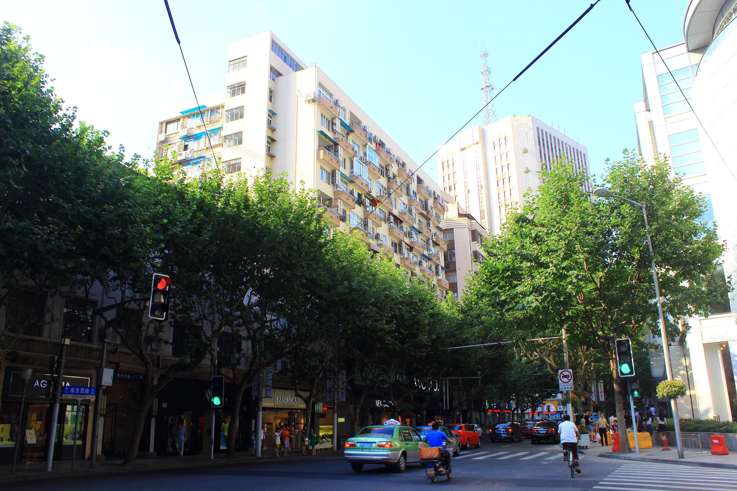 中文（中国大陆）: 南京西路茂名北路口